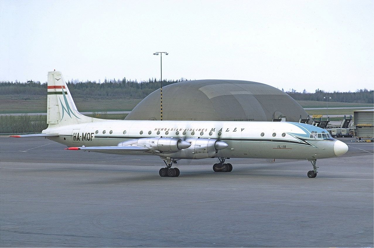 Malev Ilyushin Il-18